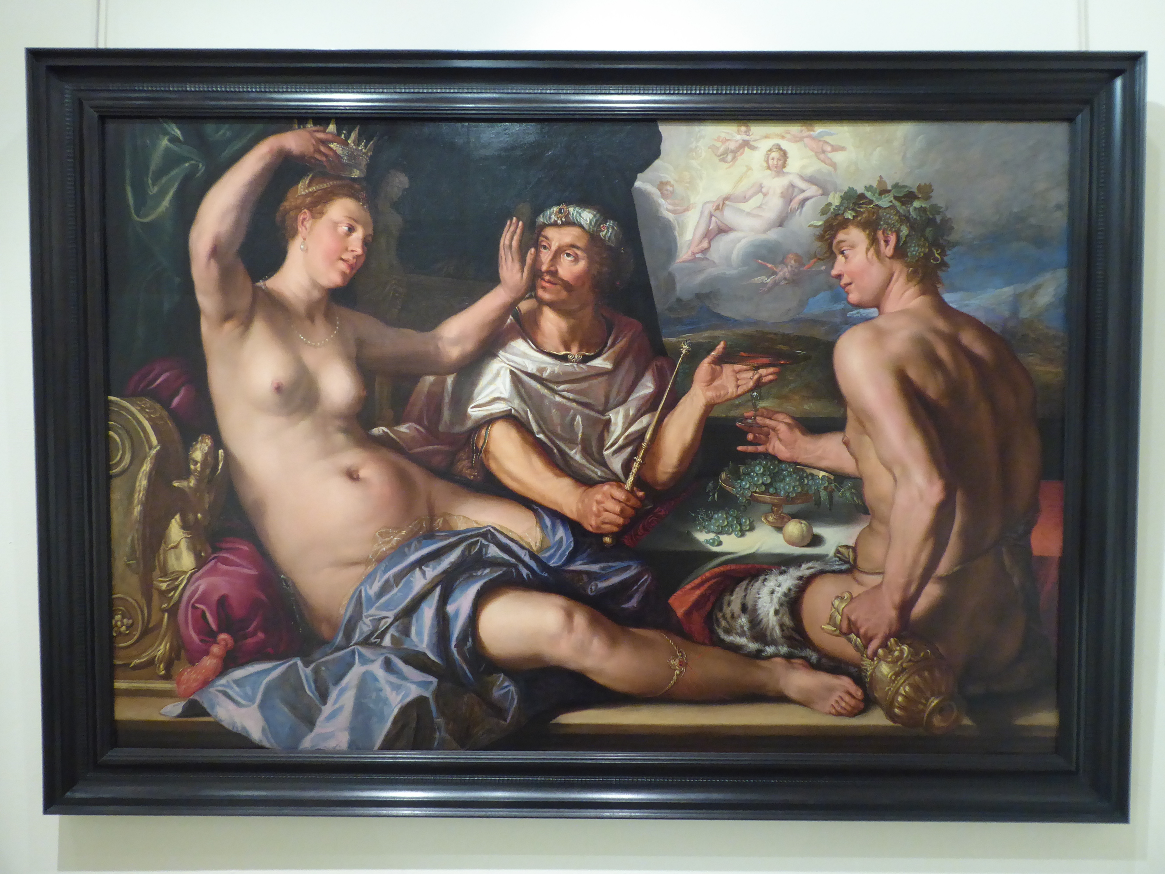 Peinture "Apamè usurpe la couronne au roi" ou "Les quatre Pouvoirs", peint en 1614 par Hendricks Goltzius. Seul tableau signé et daté conservé en Belgique sur la soixantaine répertoriée dans le monde. Peinture faisant partie du legs Hauzeur de Simony en 1909. Œuvre exposée au Musée des Beaux-Arts et de la Céramique de Verviers.